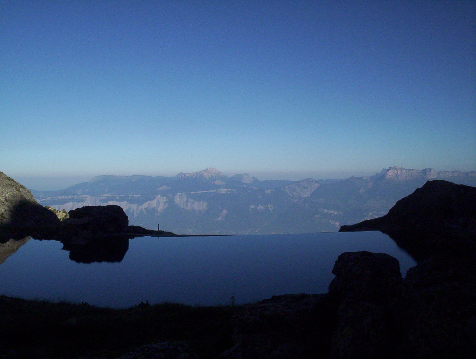 Lac du Crozet